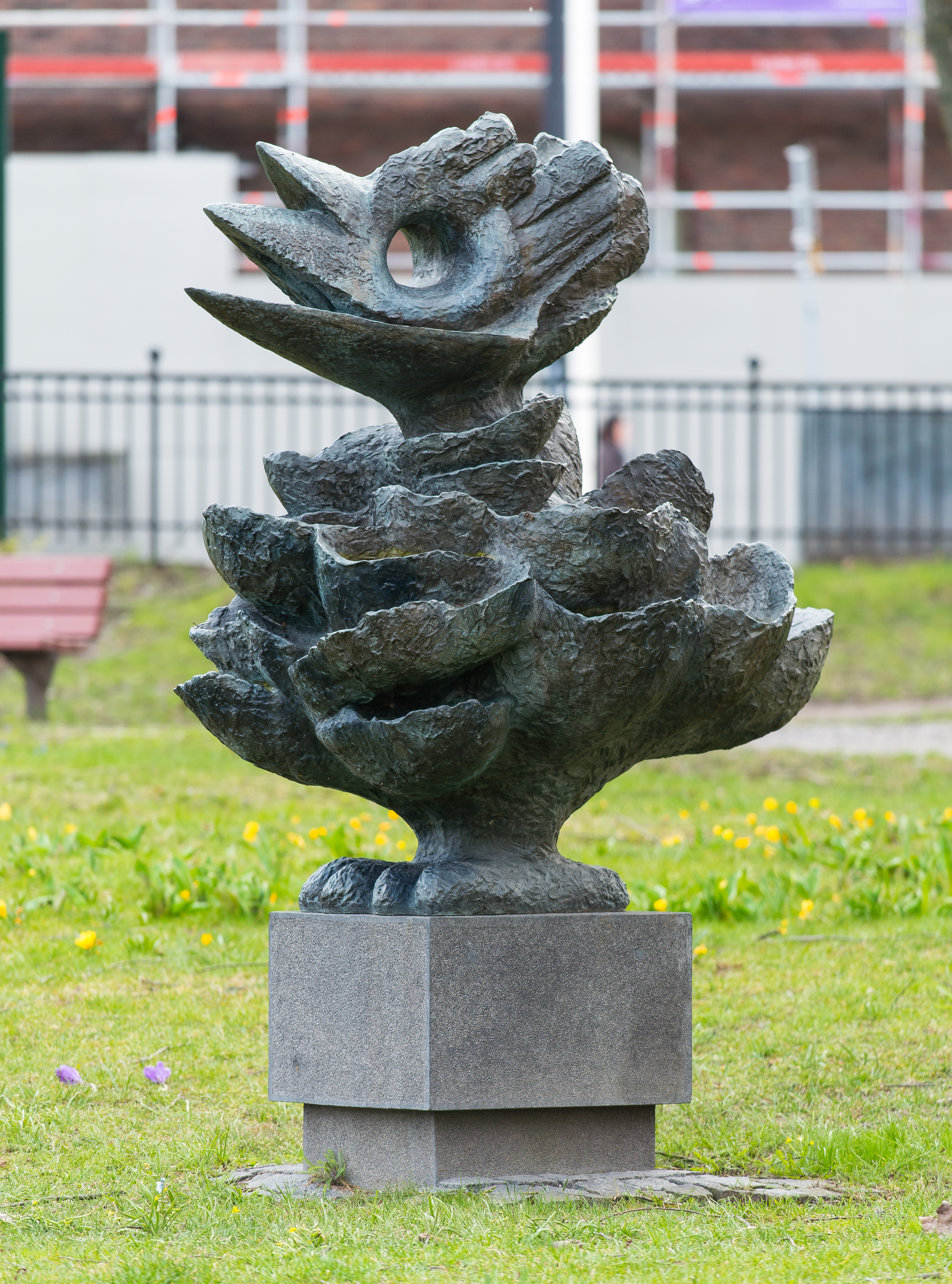 Tyra Lundgrens skulptur "Fågel blå" i Serafimerparken mittemot Stockholms stadshus i april 2015.